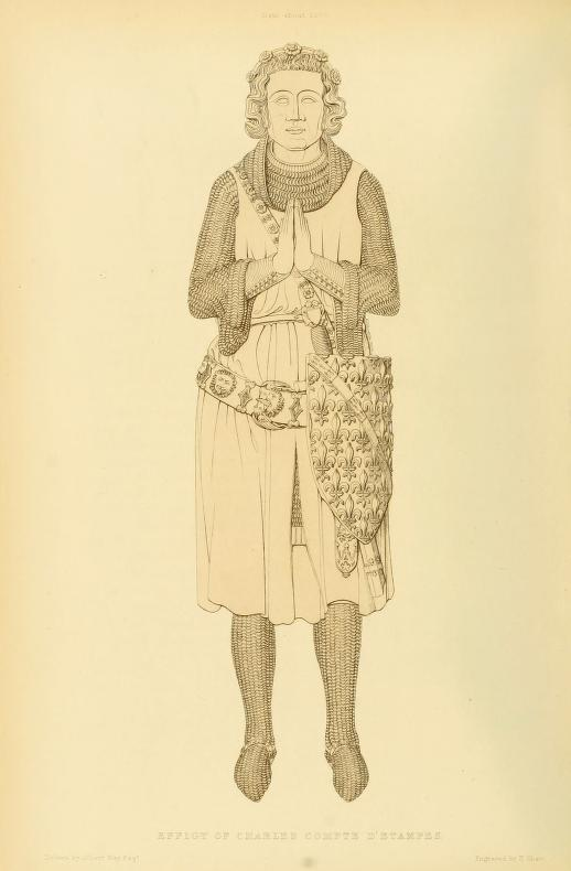 Charles d'Évreux